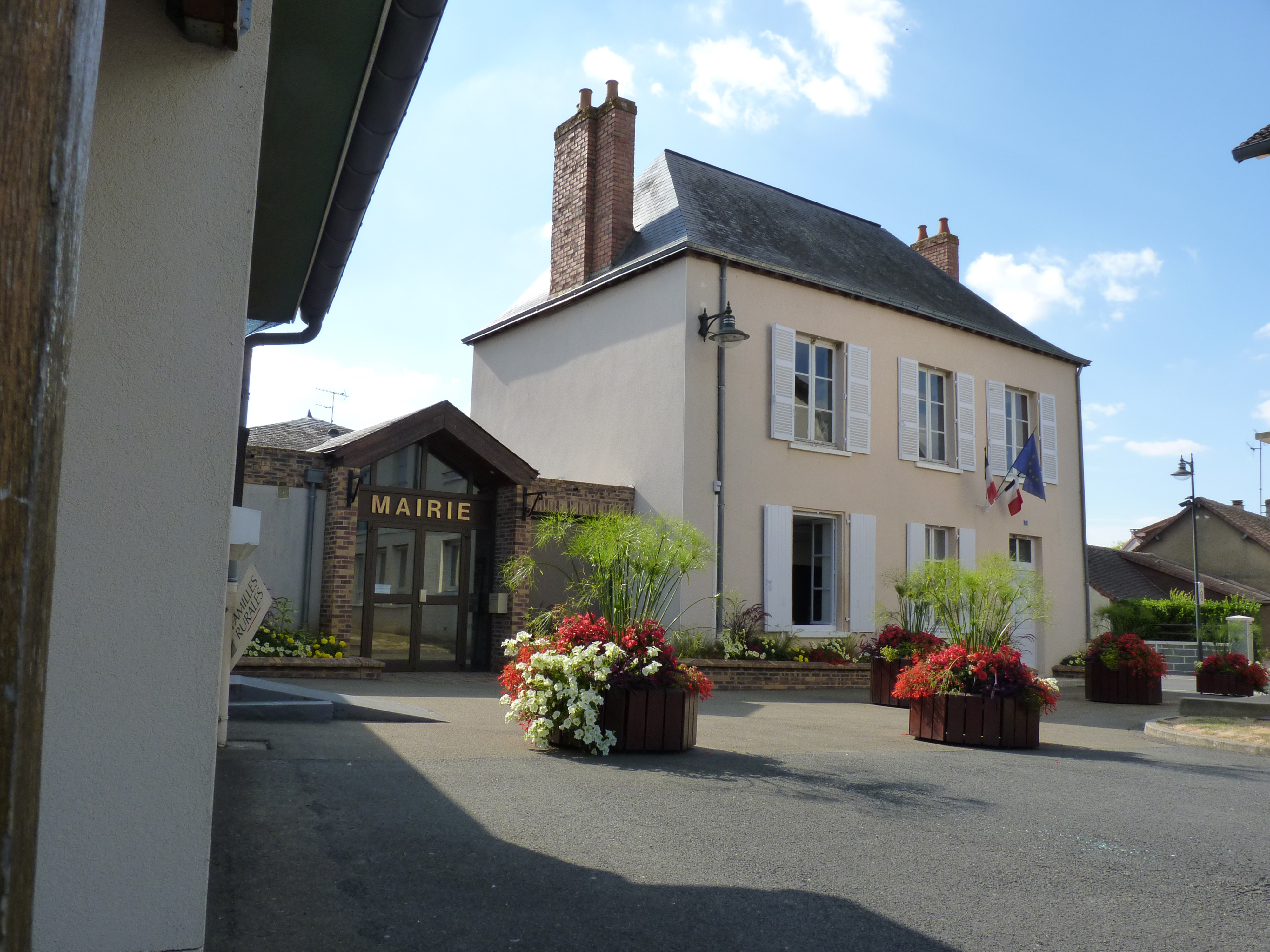 Sarthe - Neuville-sur-Sarthe - Mairie